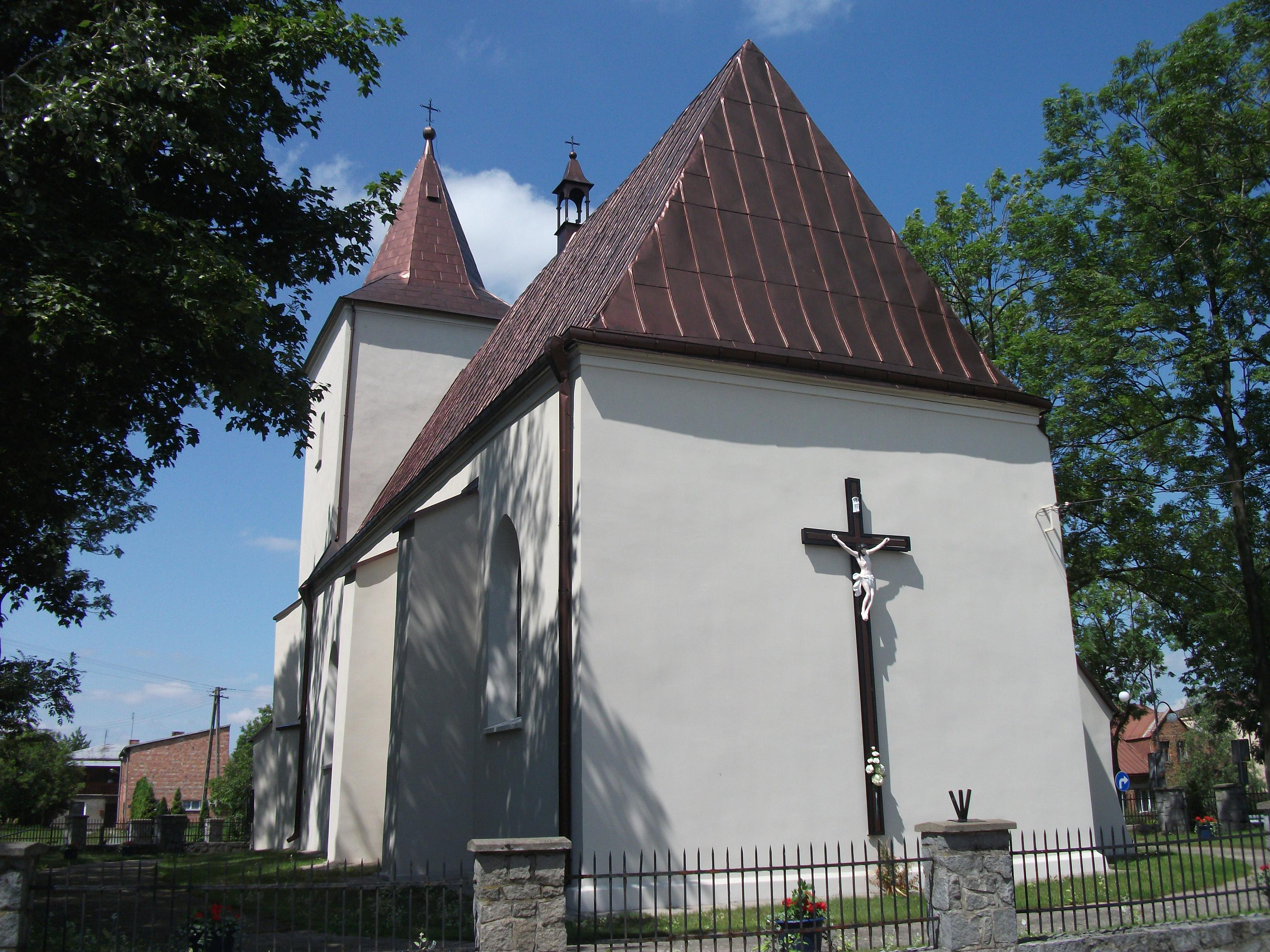 Kościół w Dąbrowie k/Wielunia